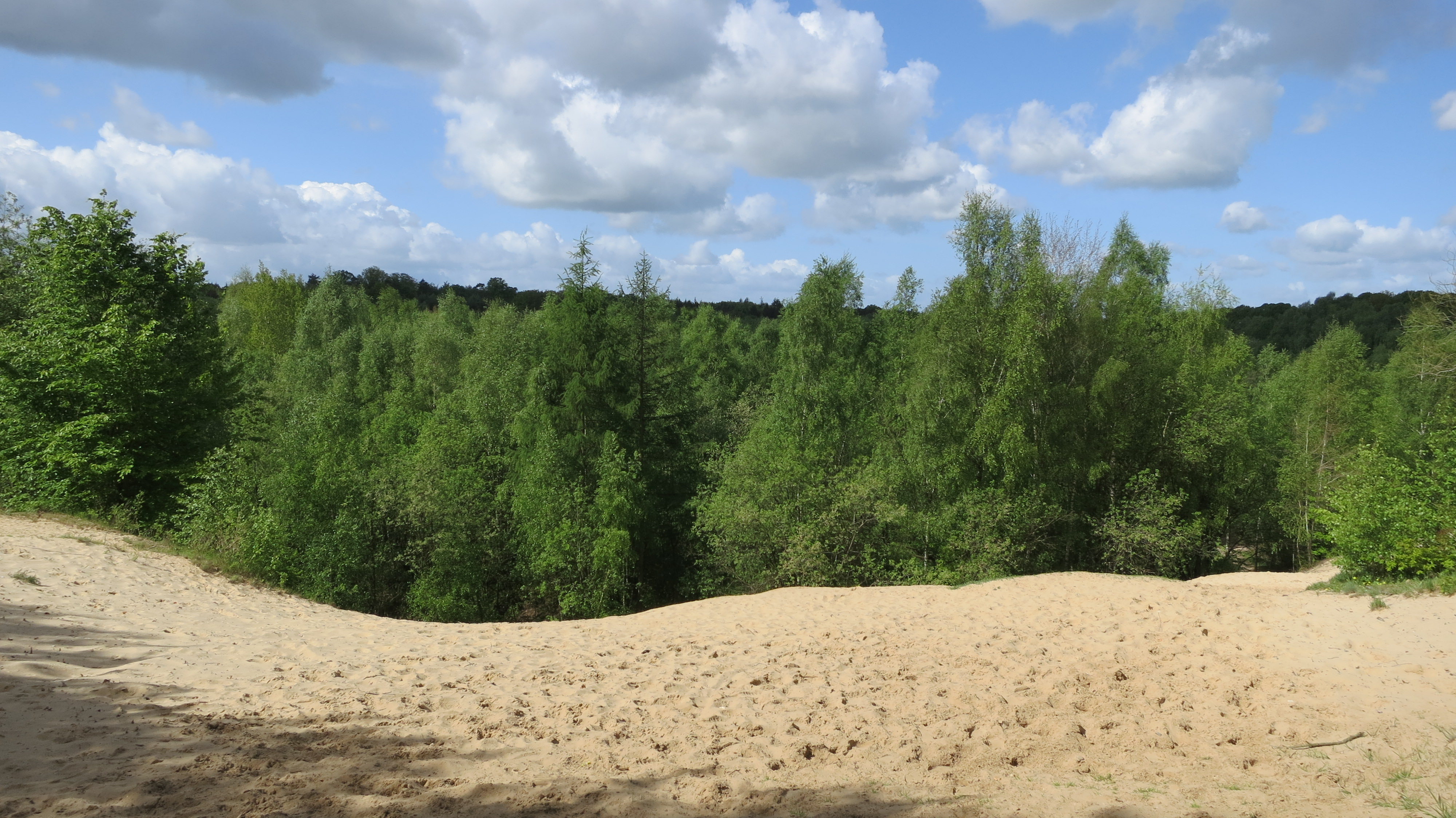 Die Kochkuhle vom Ostrand aus gesehen